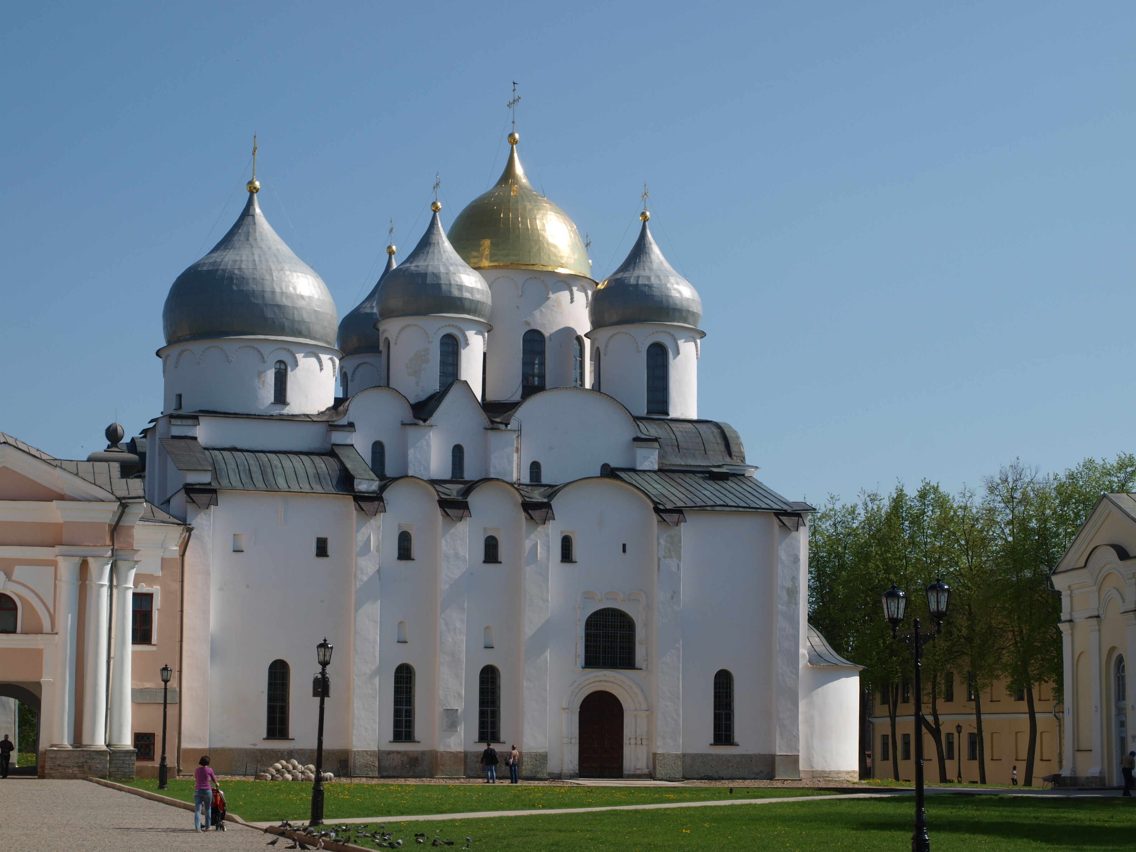 Собор Софийский: Великий Новгород, Новгородская область